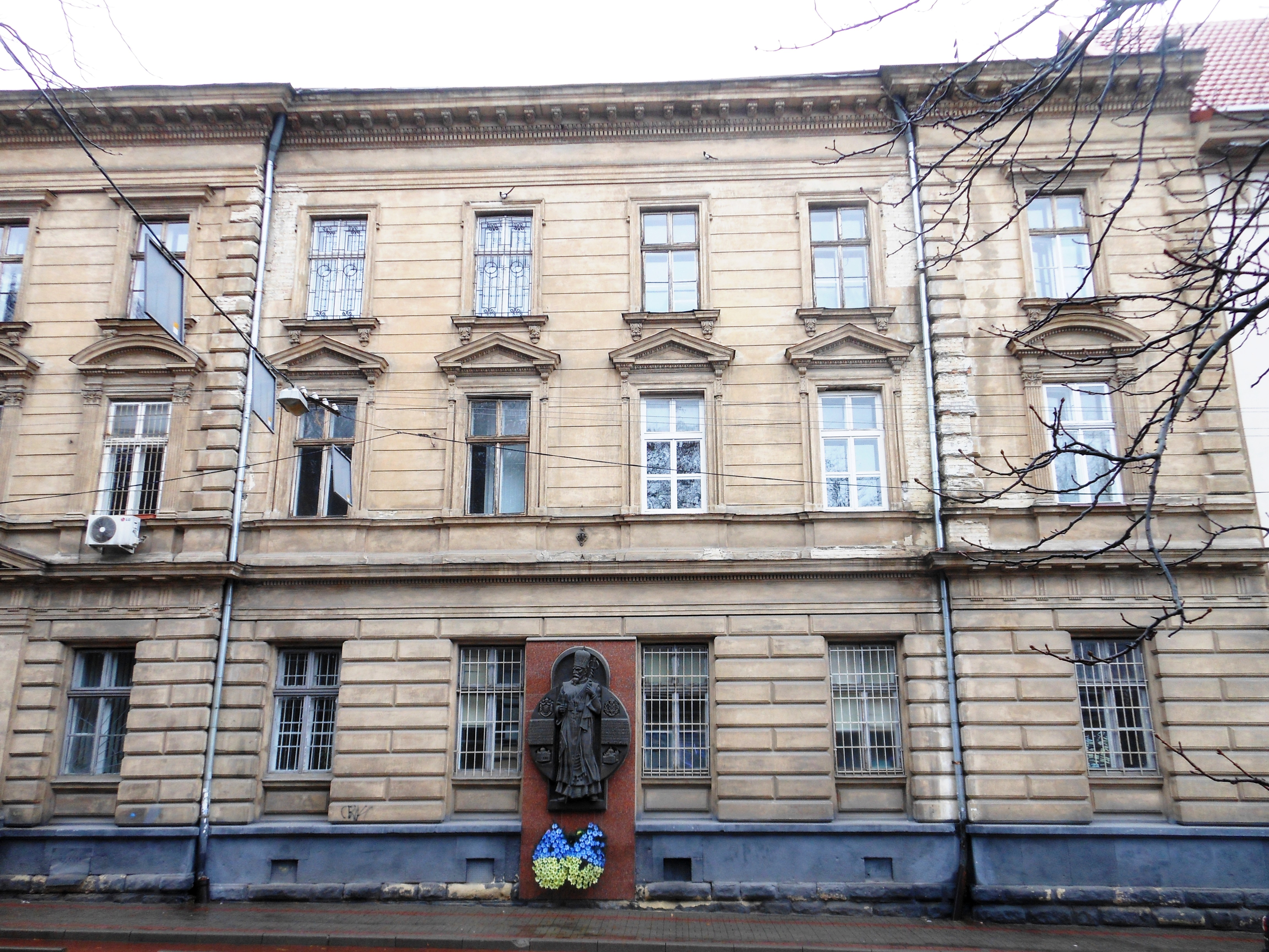 Будинок, де містилася Богословська греко-католицька академія, яку очолював патріарх Йосип Сліпий, Львів, Коперника вул., 36